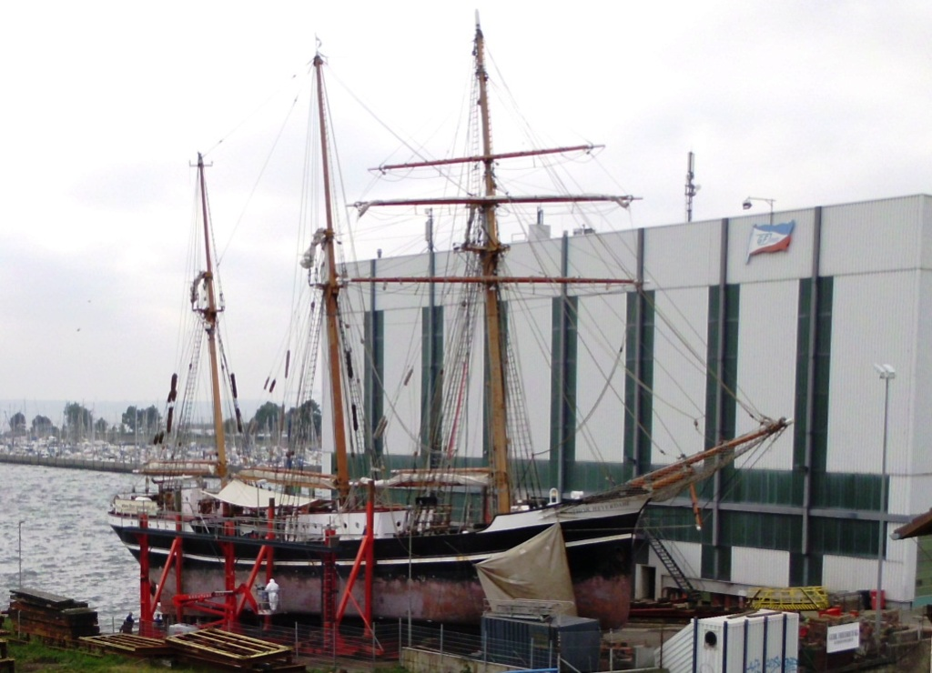 Blick auf das Slip und die Halle der Friedrichwerft